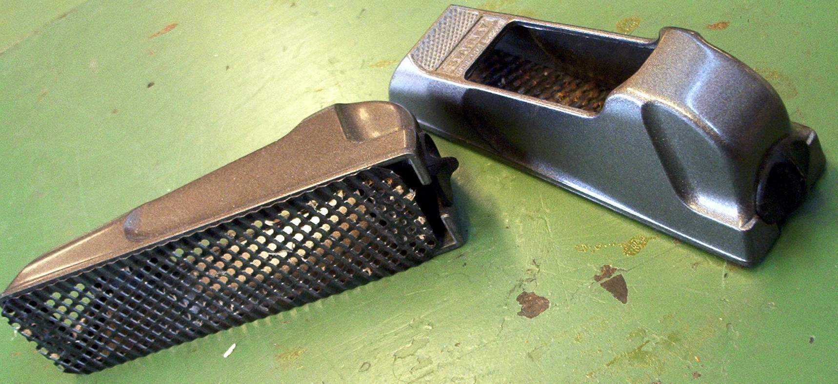 Schaafrasp